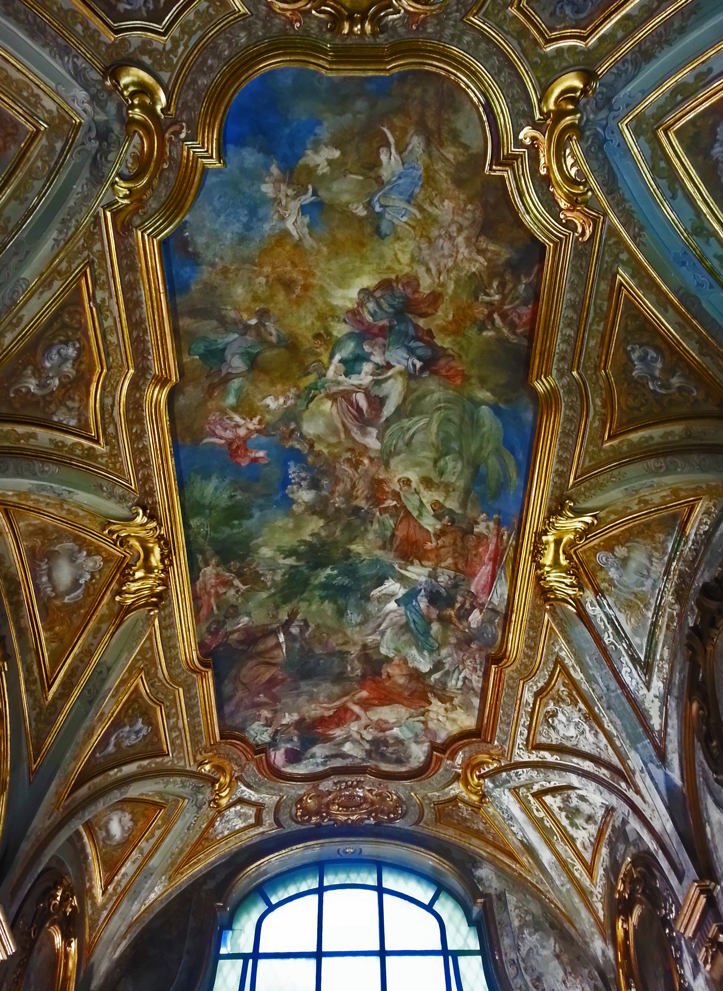 Affresco di Filippo Falciatore